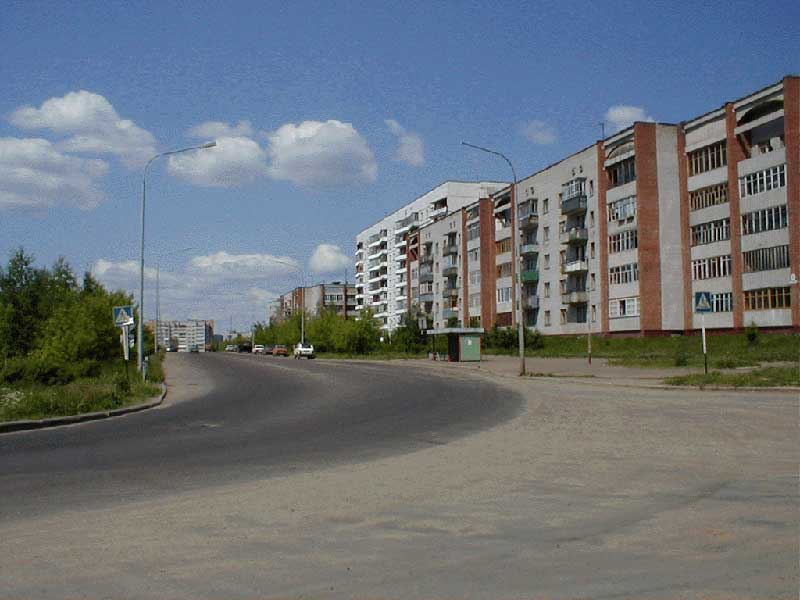 Улица Володарского (Кирово-Чепецк, 9 микрорайон)